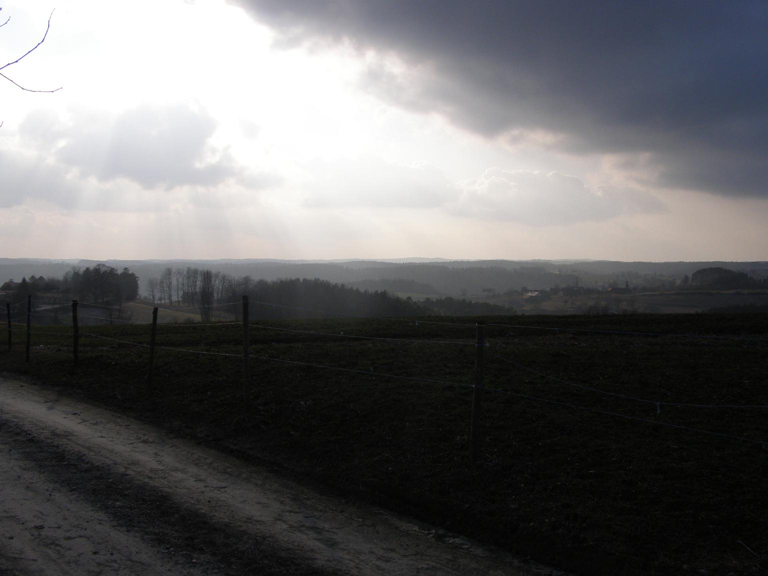 Čepinci, slovenian village